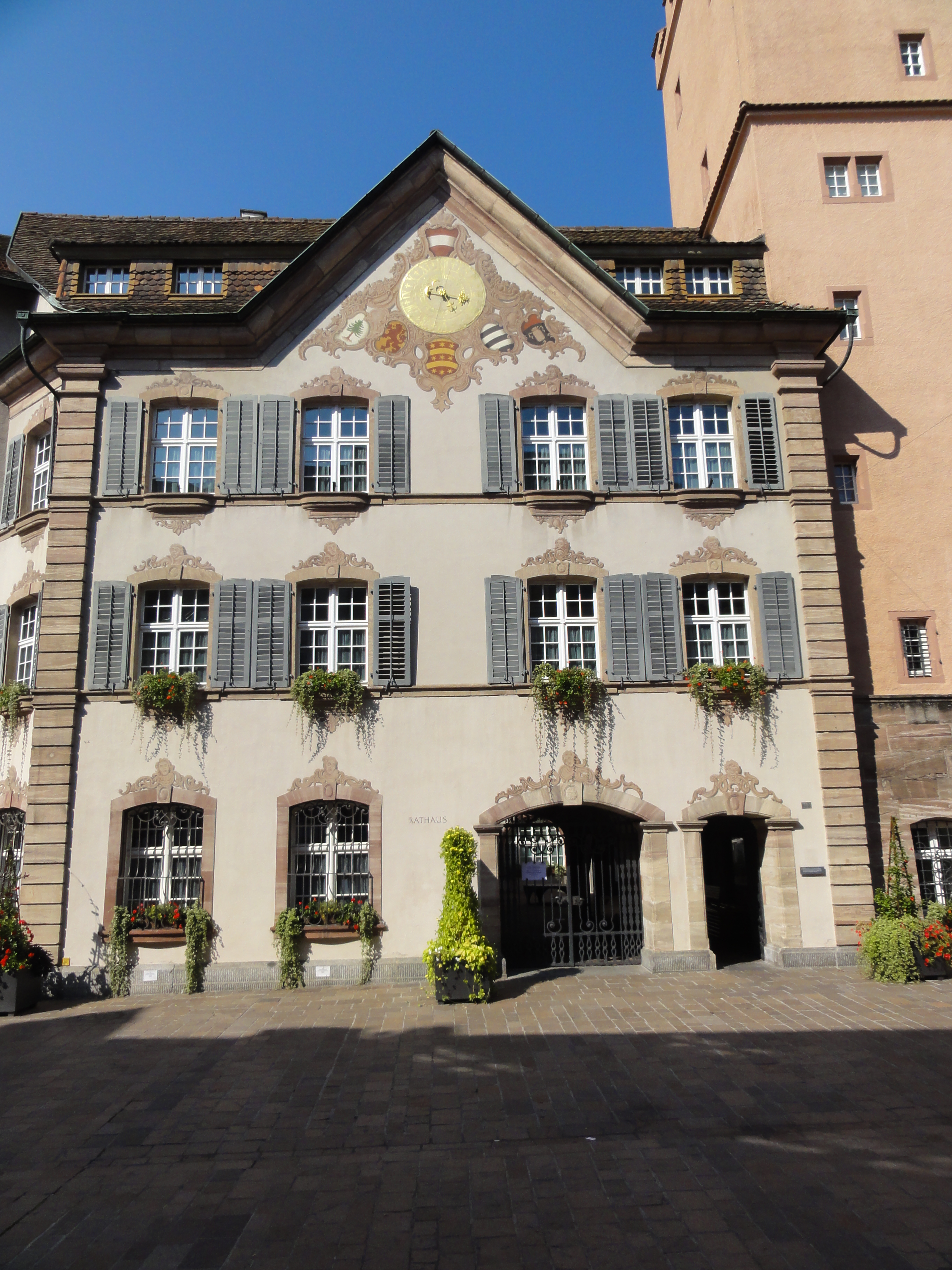 Rheinfelden, Aargau GPS data may be inaccurate. EXIF data regarding date and time may be inaccurate.